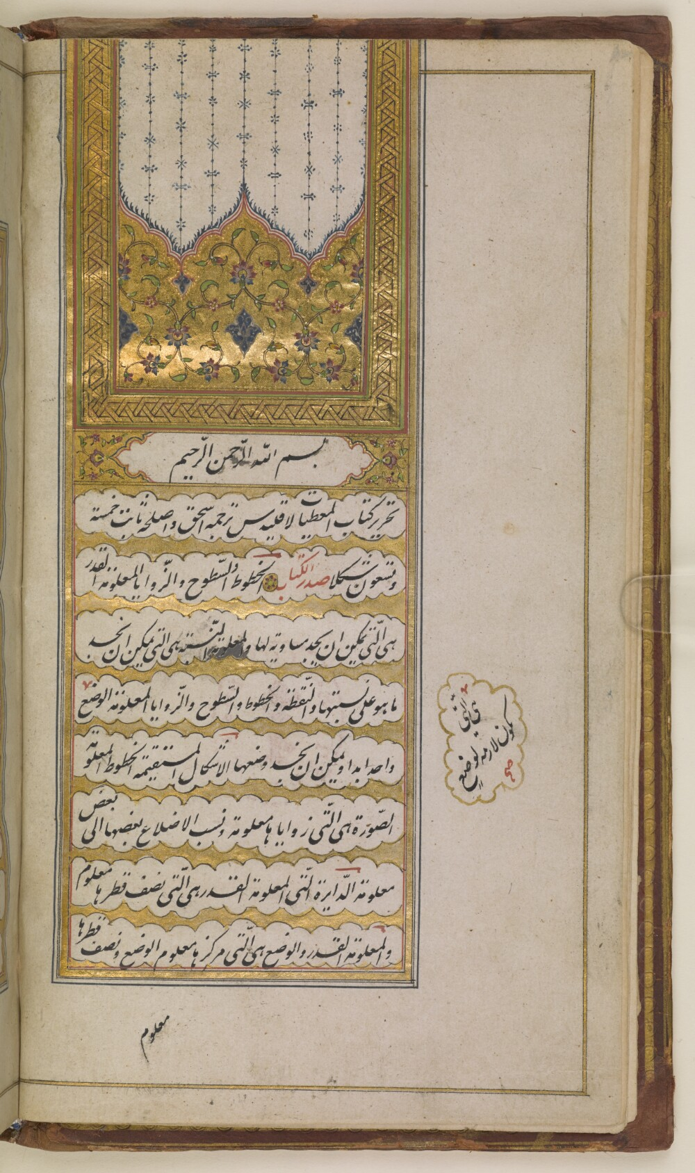 الصفحة الأولى من كتاب المعطيات